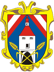 znak obce